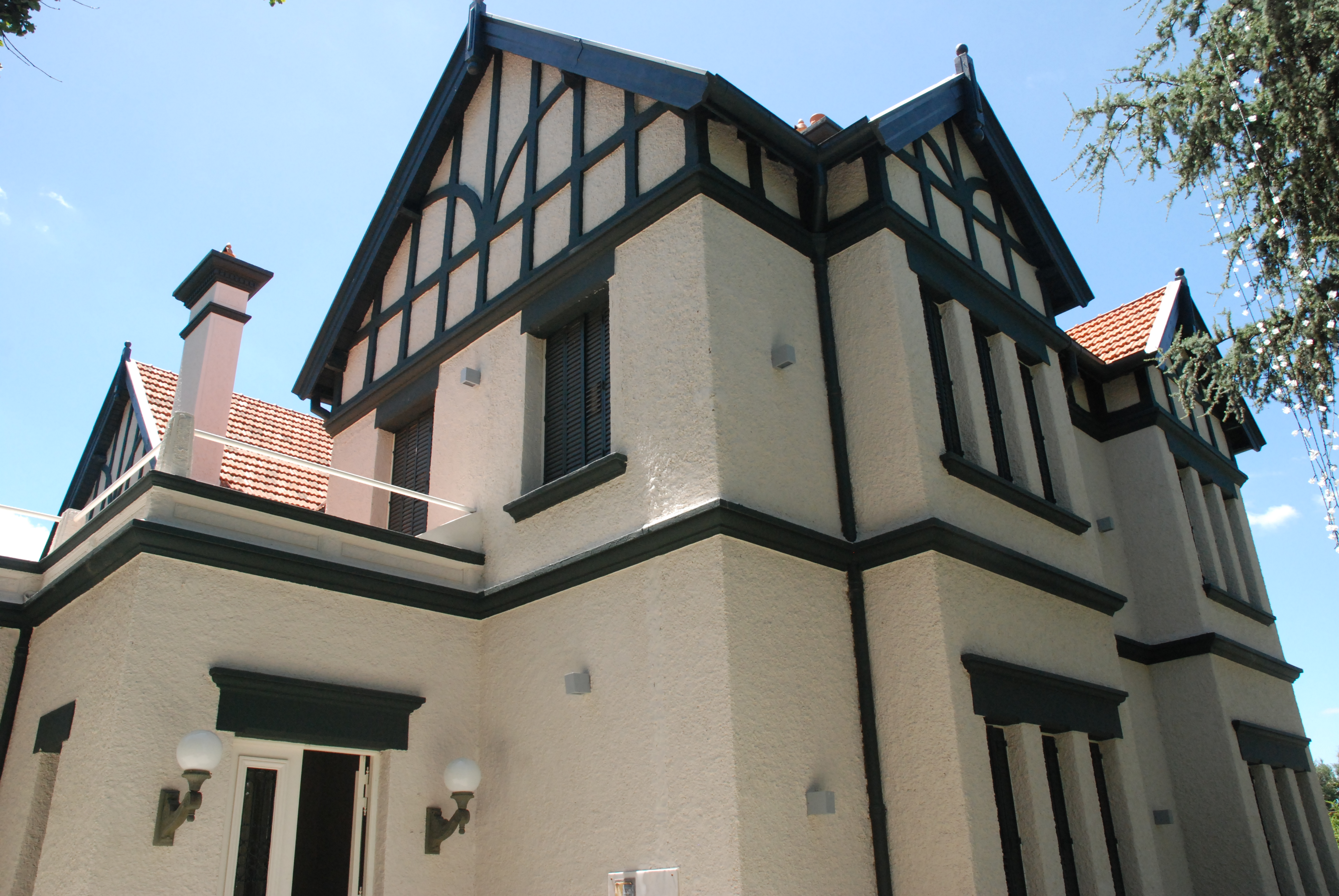 Edificio Reforma Universitaria, donde funciona el Rectorado de la UNNOBA (Universidad Nacional del Noroeste de la Provincia de Buenos Aires) en Junín, Argentina.